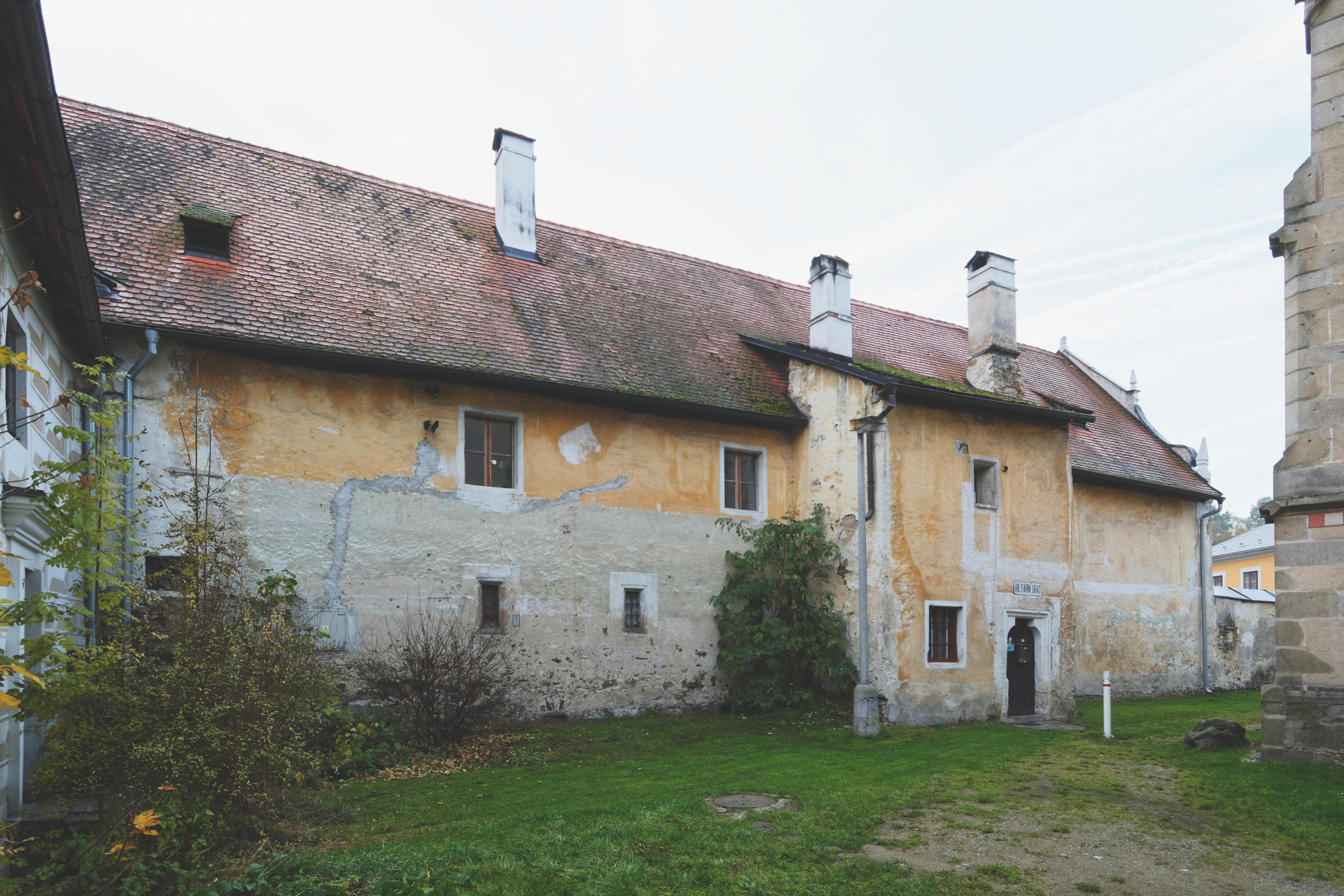 Fara, Rožmberk nad Vltavou 8, za kostelem, Rožmberk nad Vltavou.